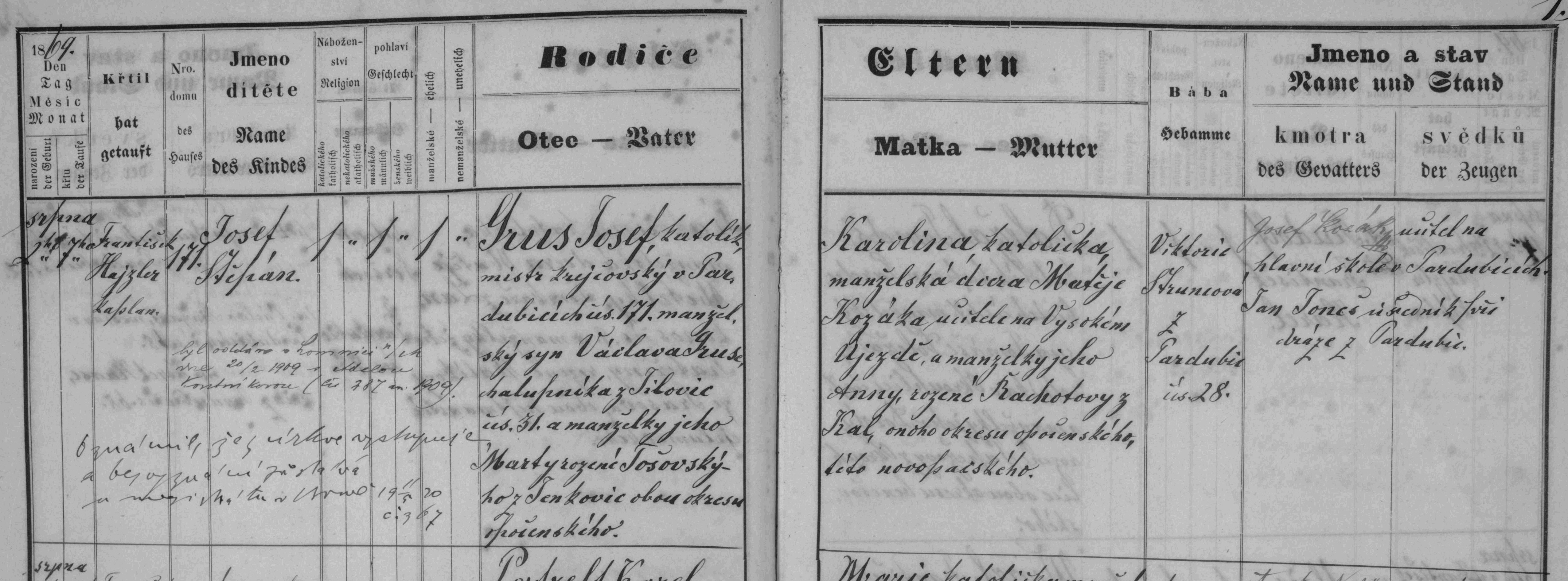 matriční zápis o narození a křtu Josefa Gruse (matrika N 1866-1872 Pardubice - Zelené Předměstí (SOA Zámrsk))